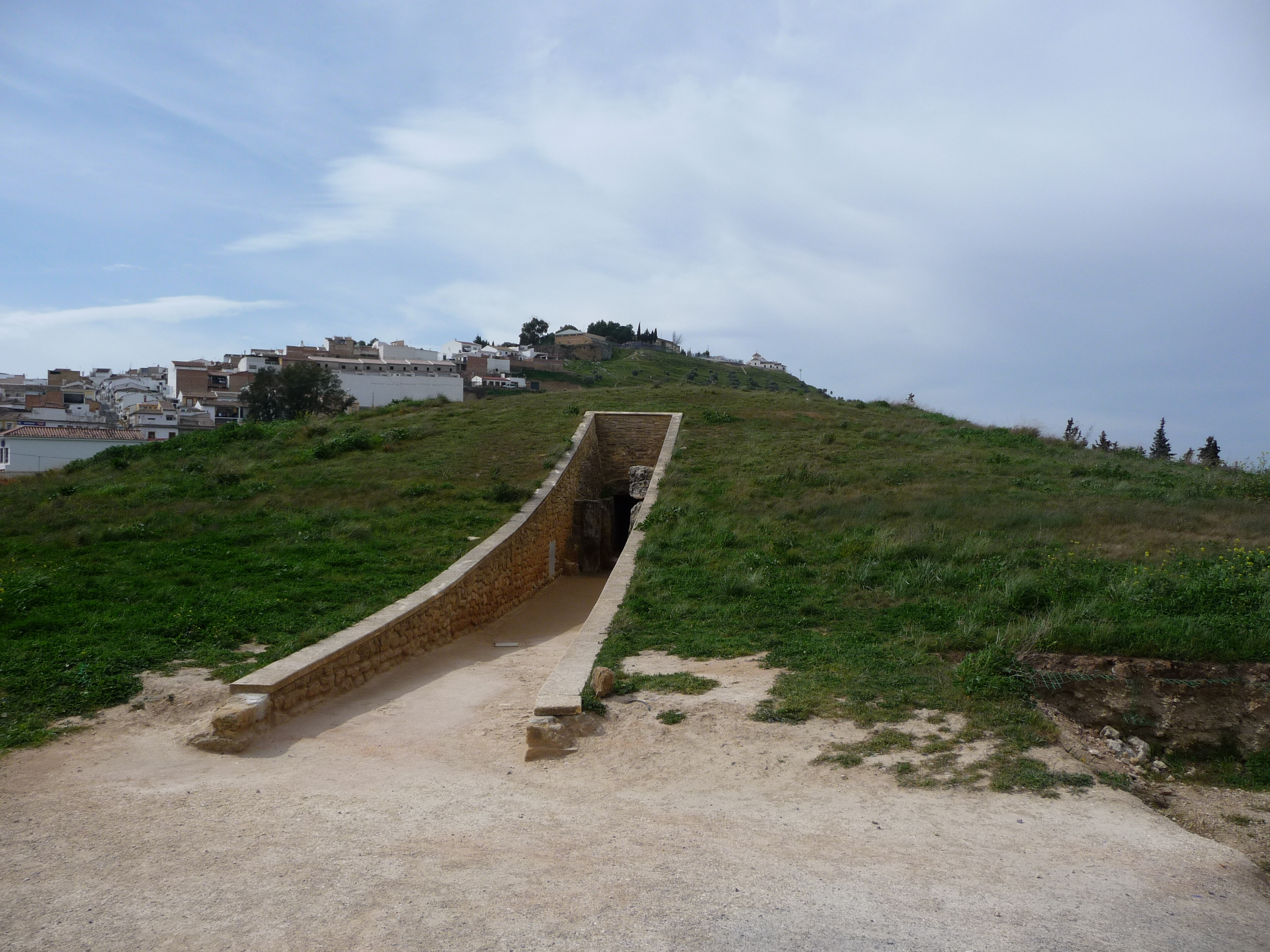 Antequera-p1010850.jpg